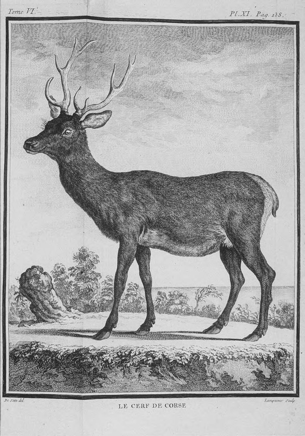 le cerf de Corse (Cervus elaphus corsicanus) - Pl.11 P.138 dépl. Paris : Imprimerie royale.